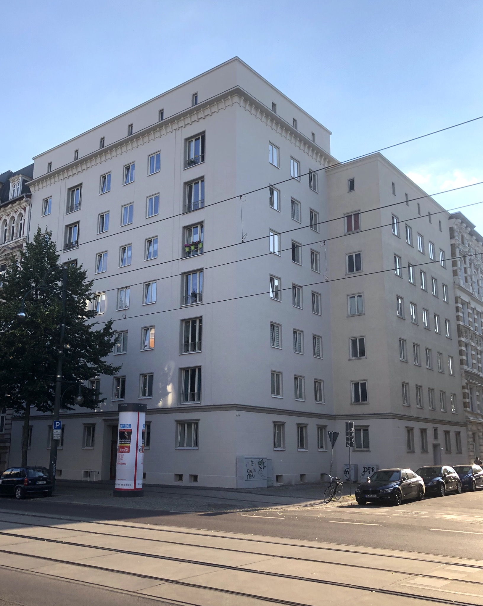 Otto-von-Guericke-Straße 47 in Magdeburg